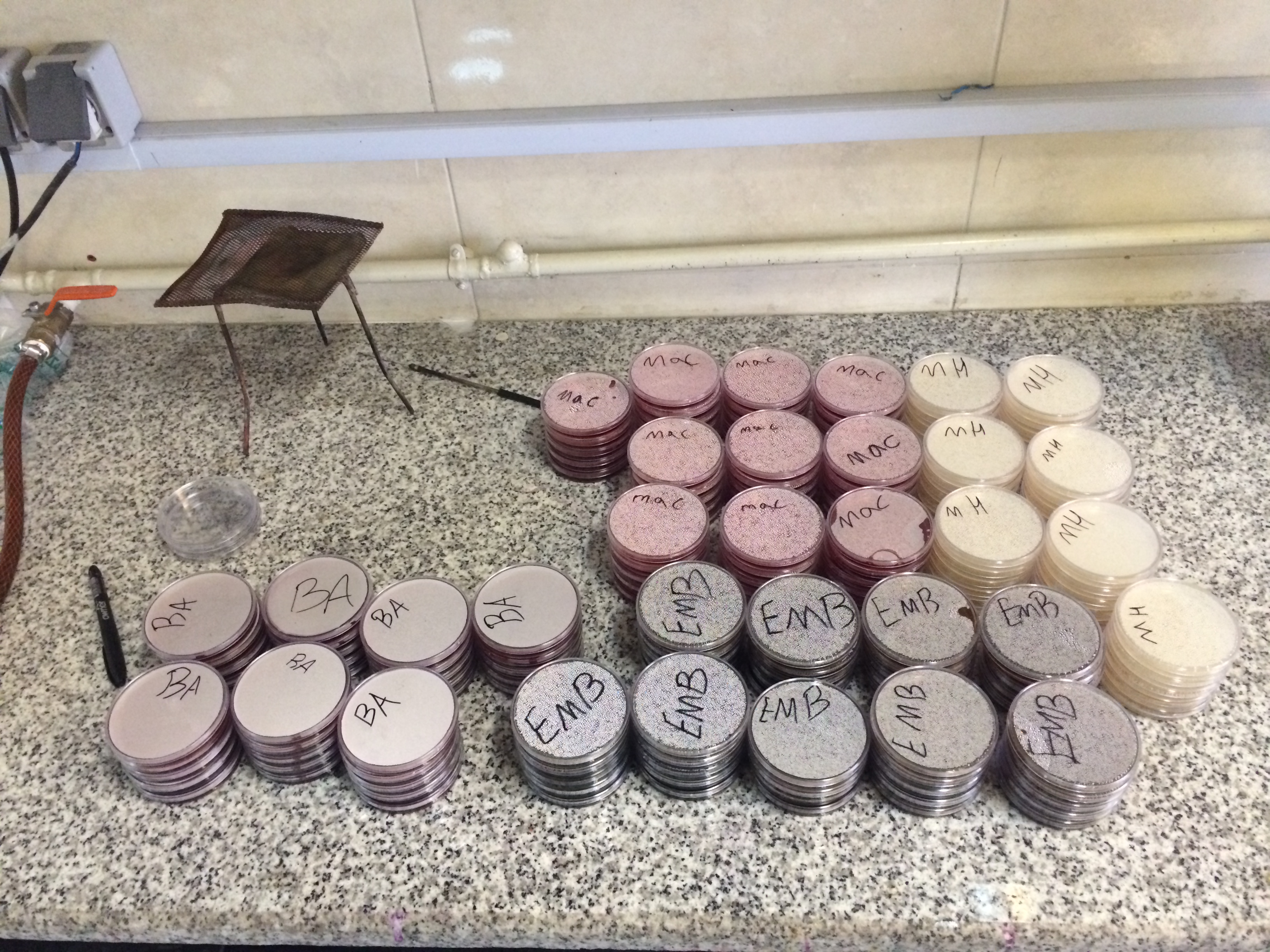 چهار نوع محیط کشت باکتری